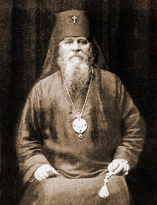 Даминан (Воскресенский)